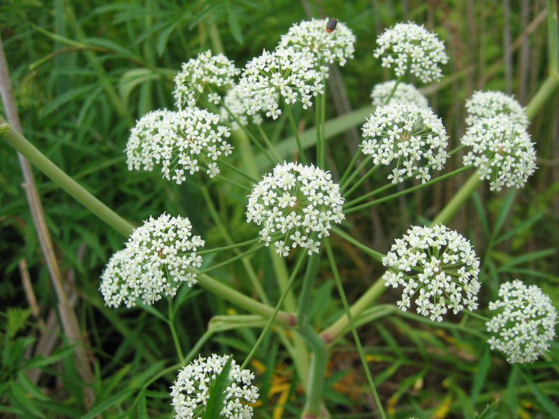 Wasserschierling Cicuta virosa, Müritz-Gebiet